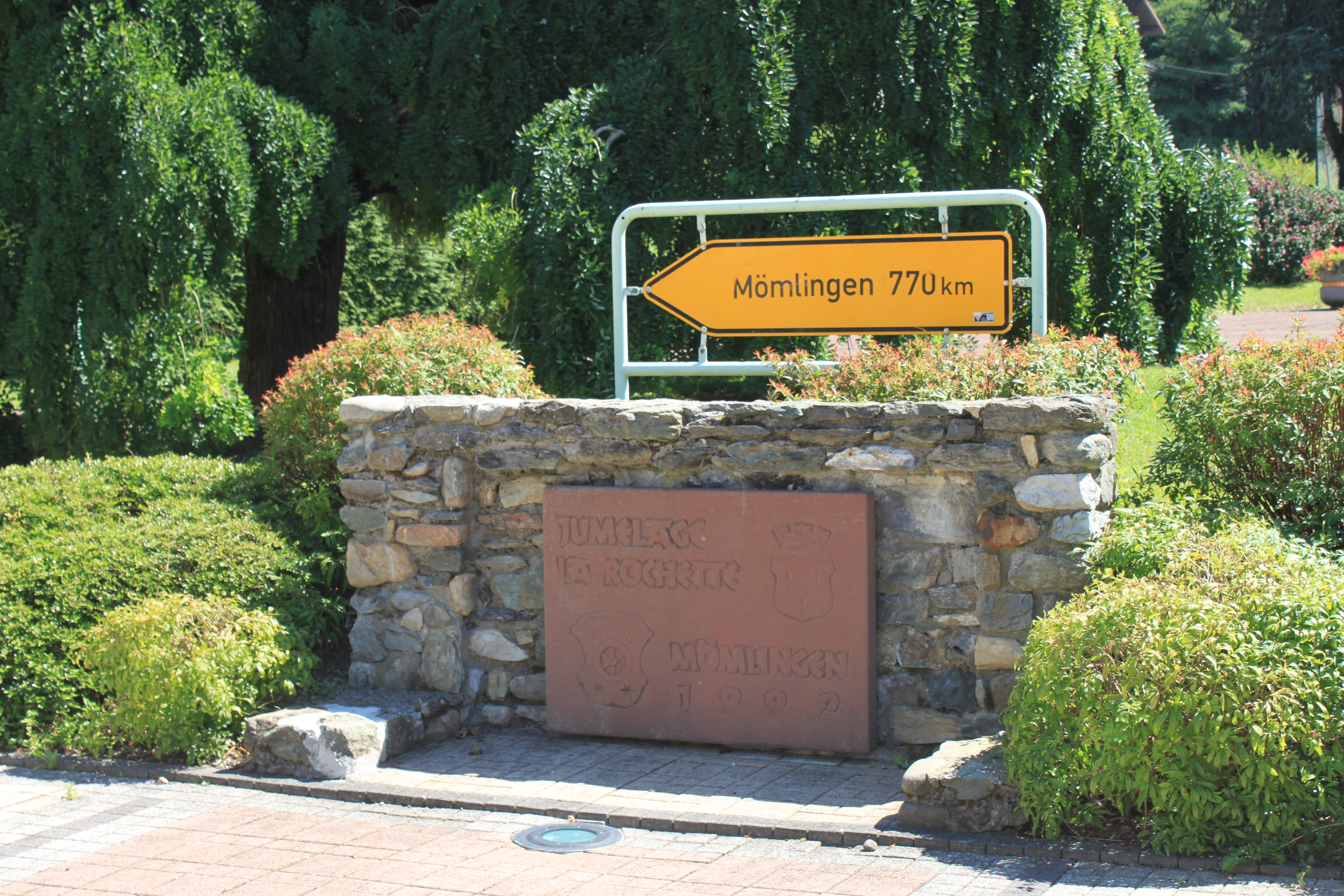 Jumelage entre La Rochette (Savoie) et Mömlingen